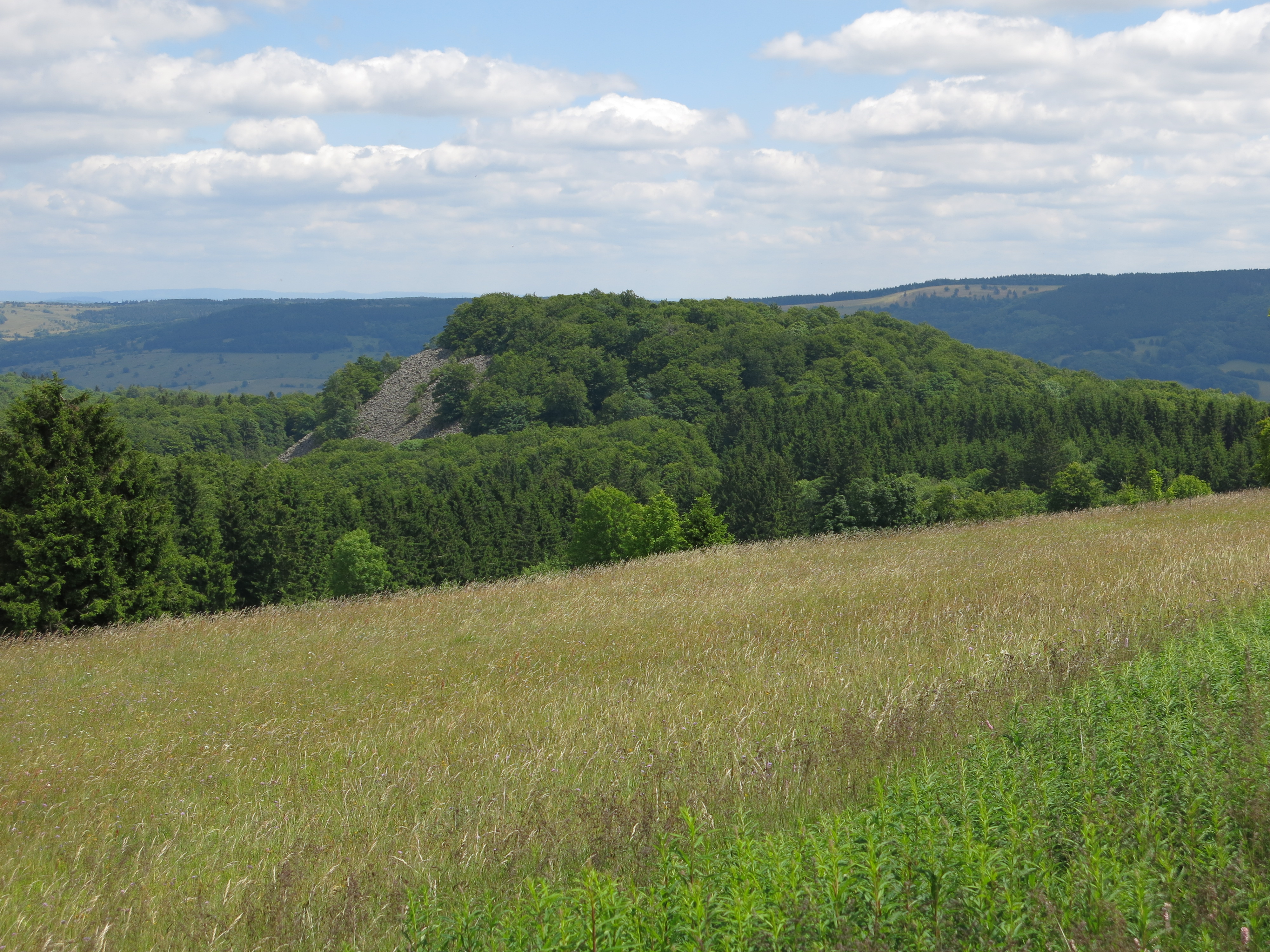 Der Schafstein von Westen (Osthang der Wasserkuppe)